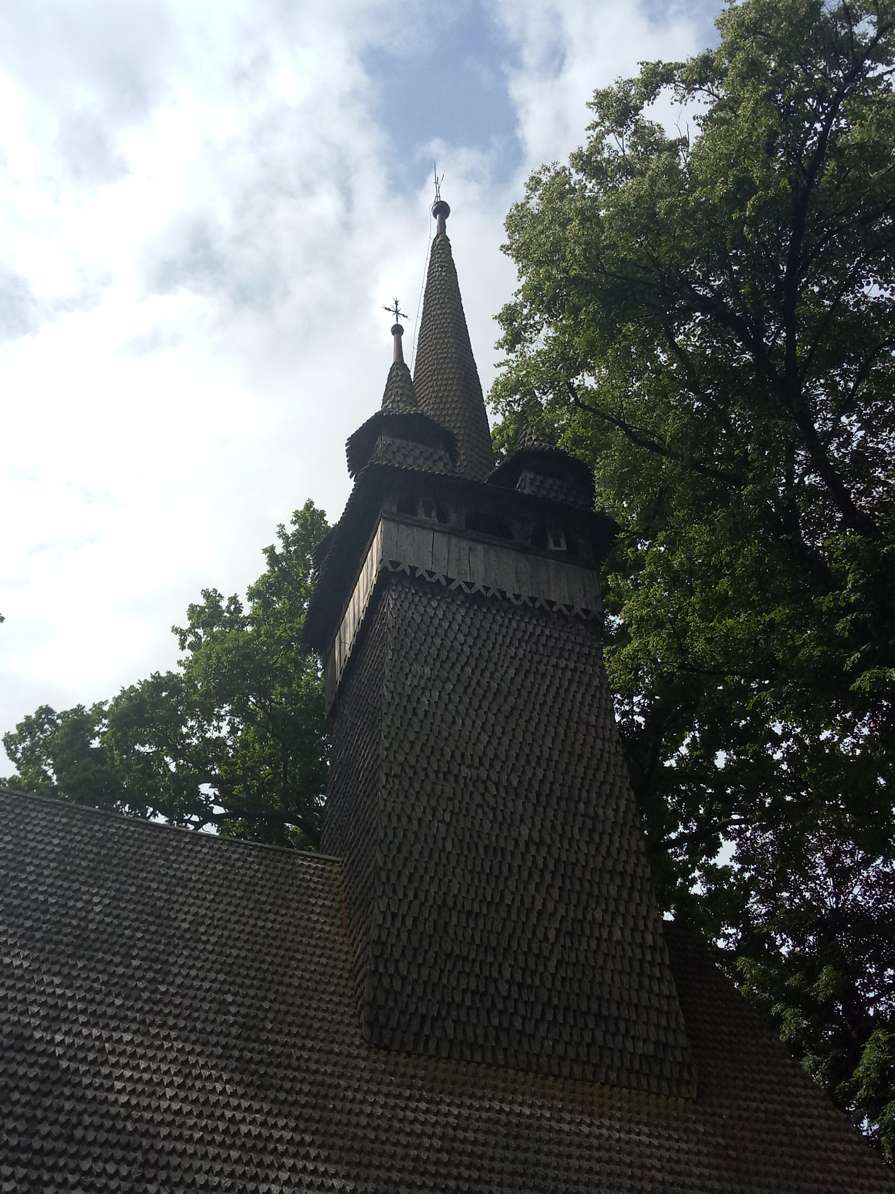 фотографія